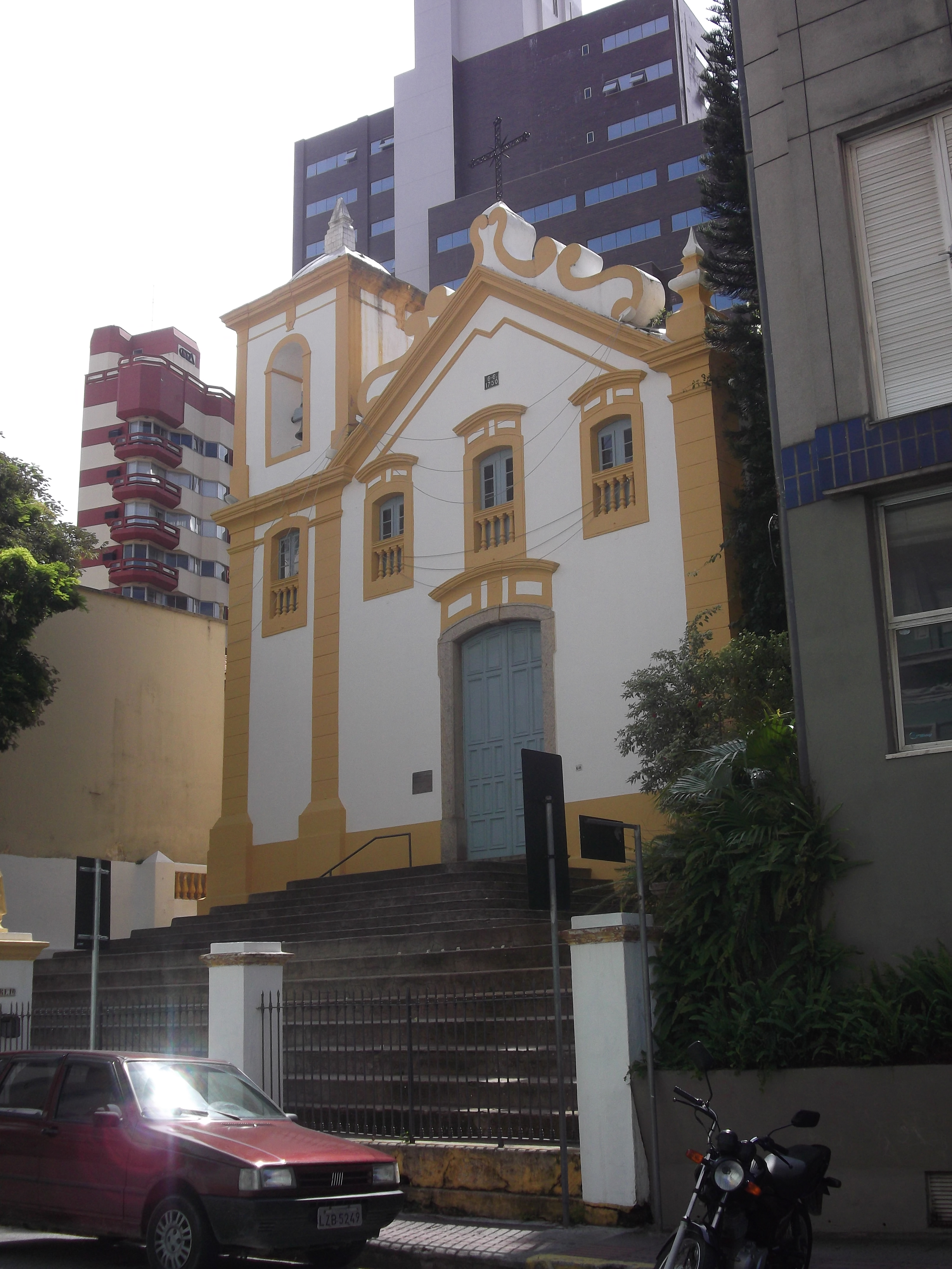 Igreja de Nossa Senhora do Rosário e São Benedito